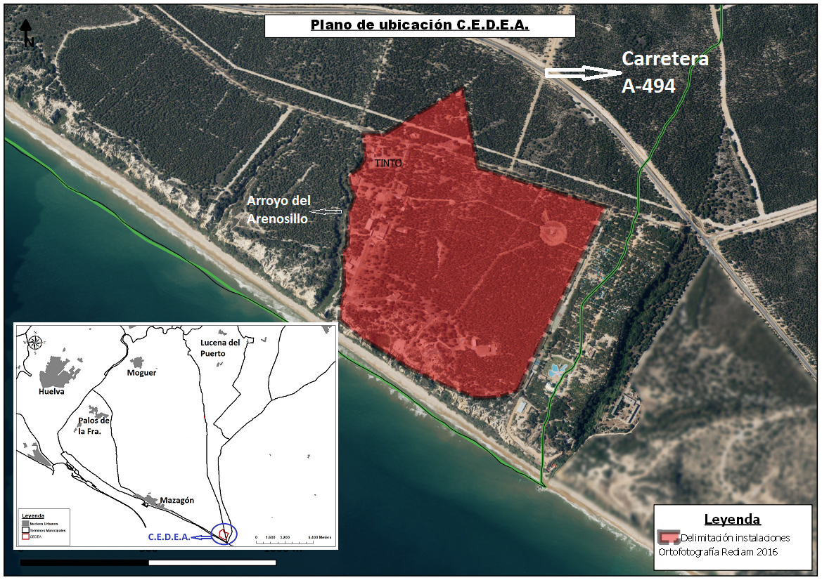 Plano de las instalaciones del C.E.D.E.A. en el termino municipal de Moguer (Andalucia - España)